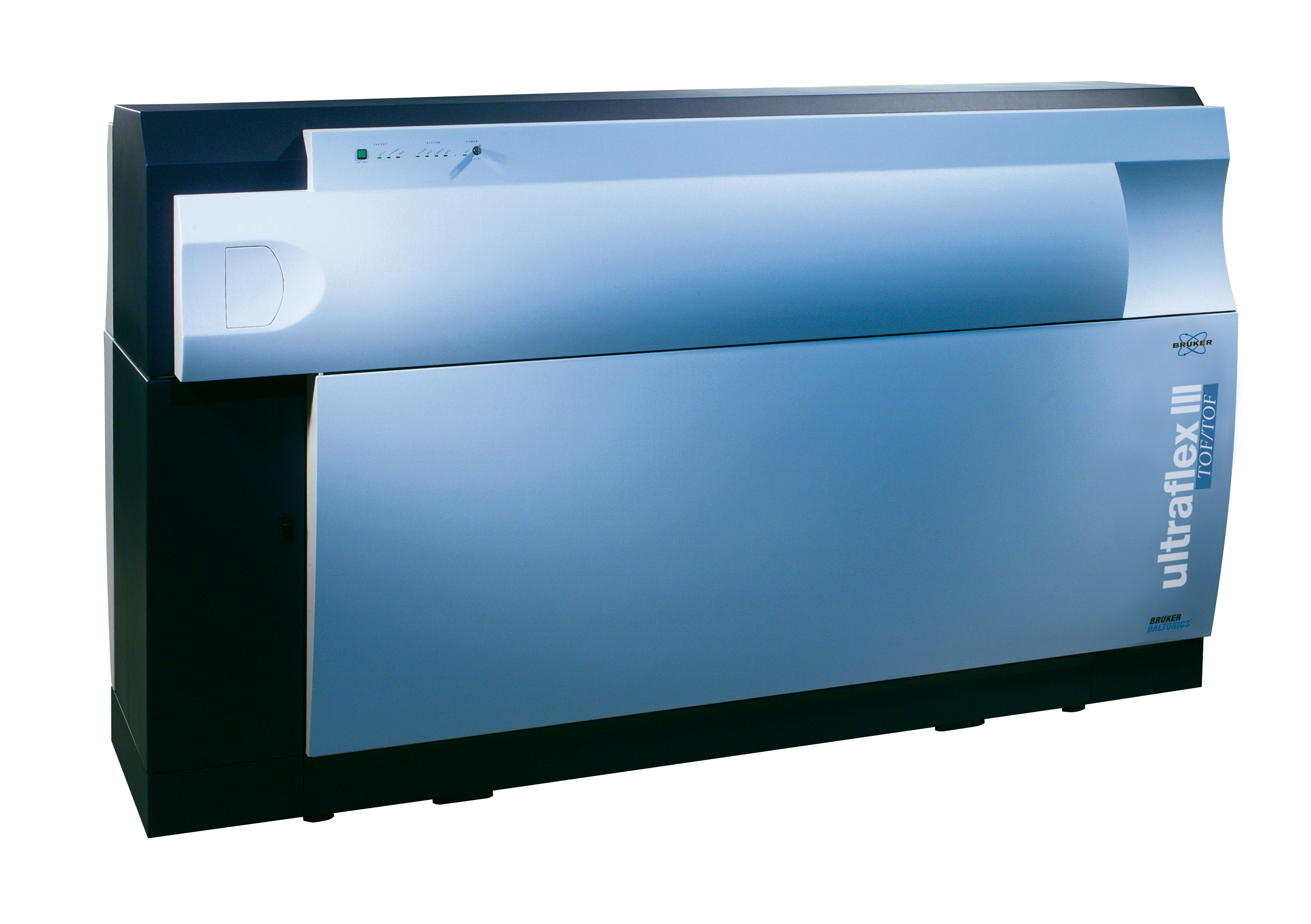 ultraflex III MALDI-TOF/TOF mass spectrometer